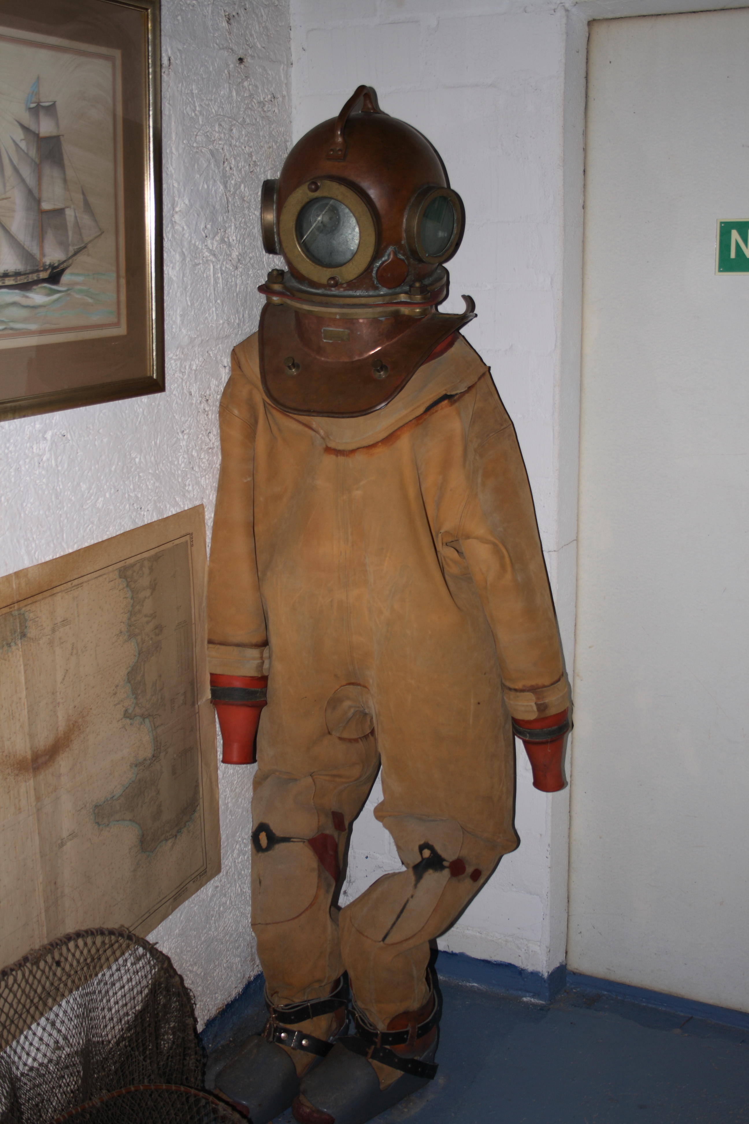 Lederner Taucheranzug mit Helm aus Kupfer